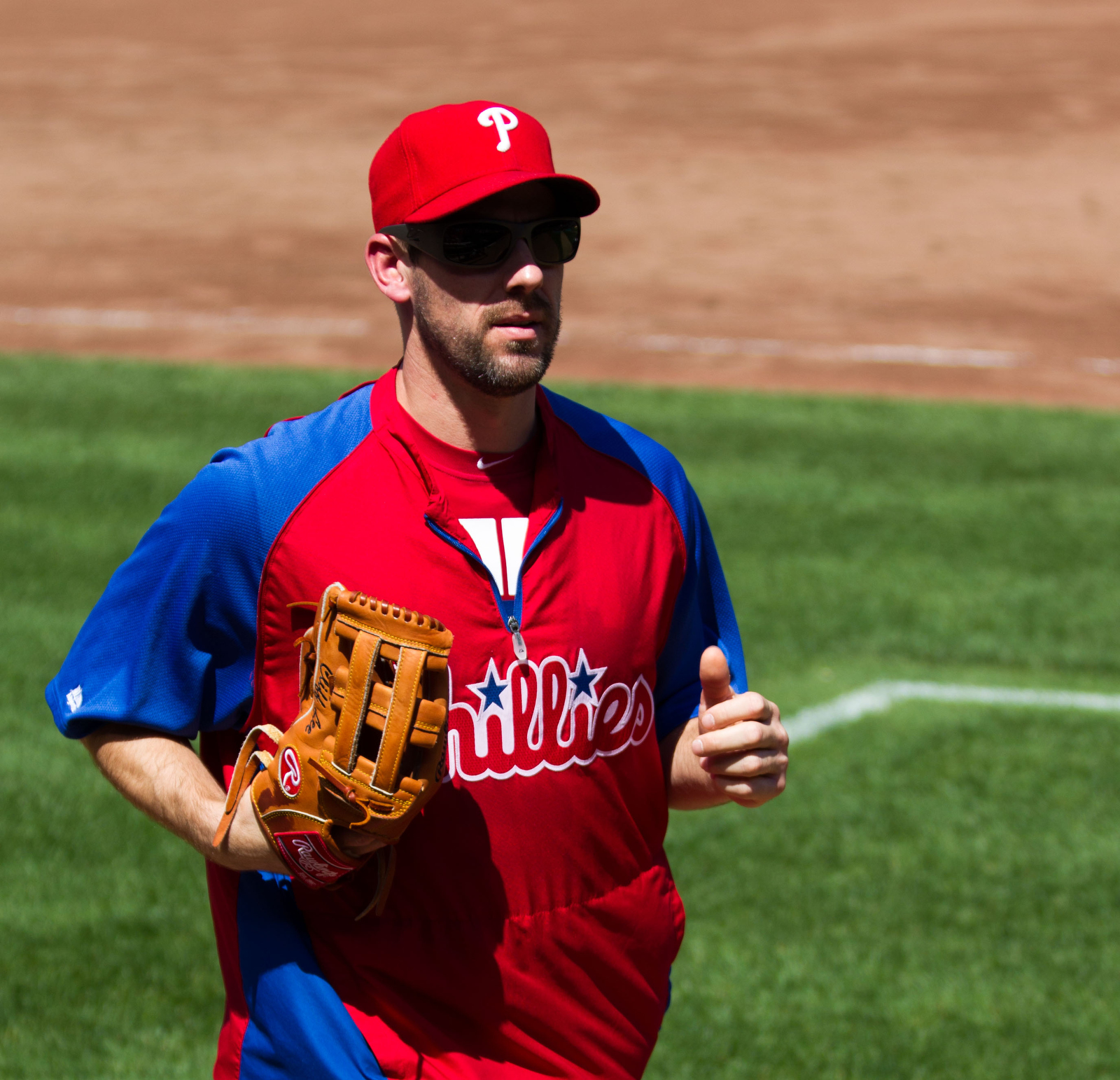 Phillies at Orioles June 9, 2012 Phillies at Orioles June 9, 2012